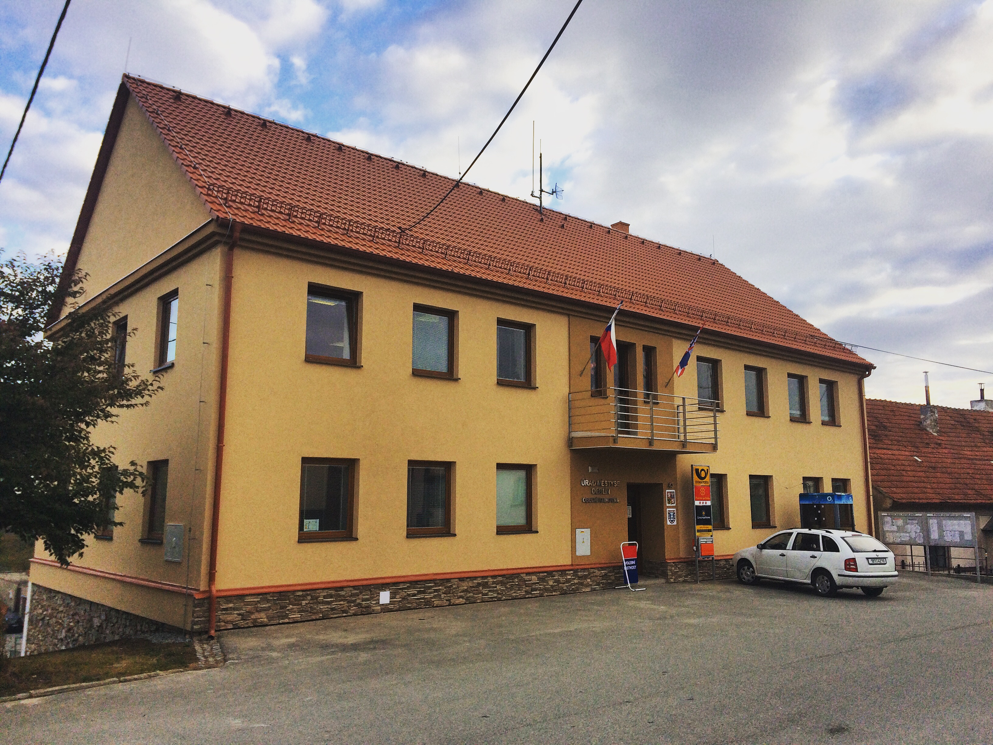 Obecní úřad v Deblíně